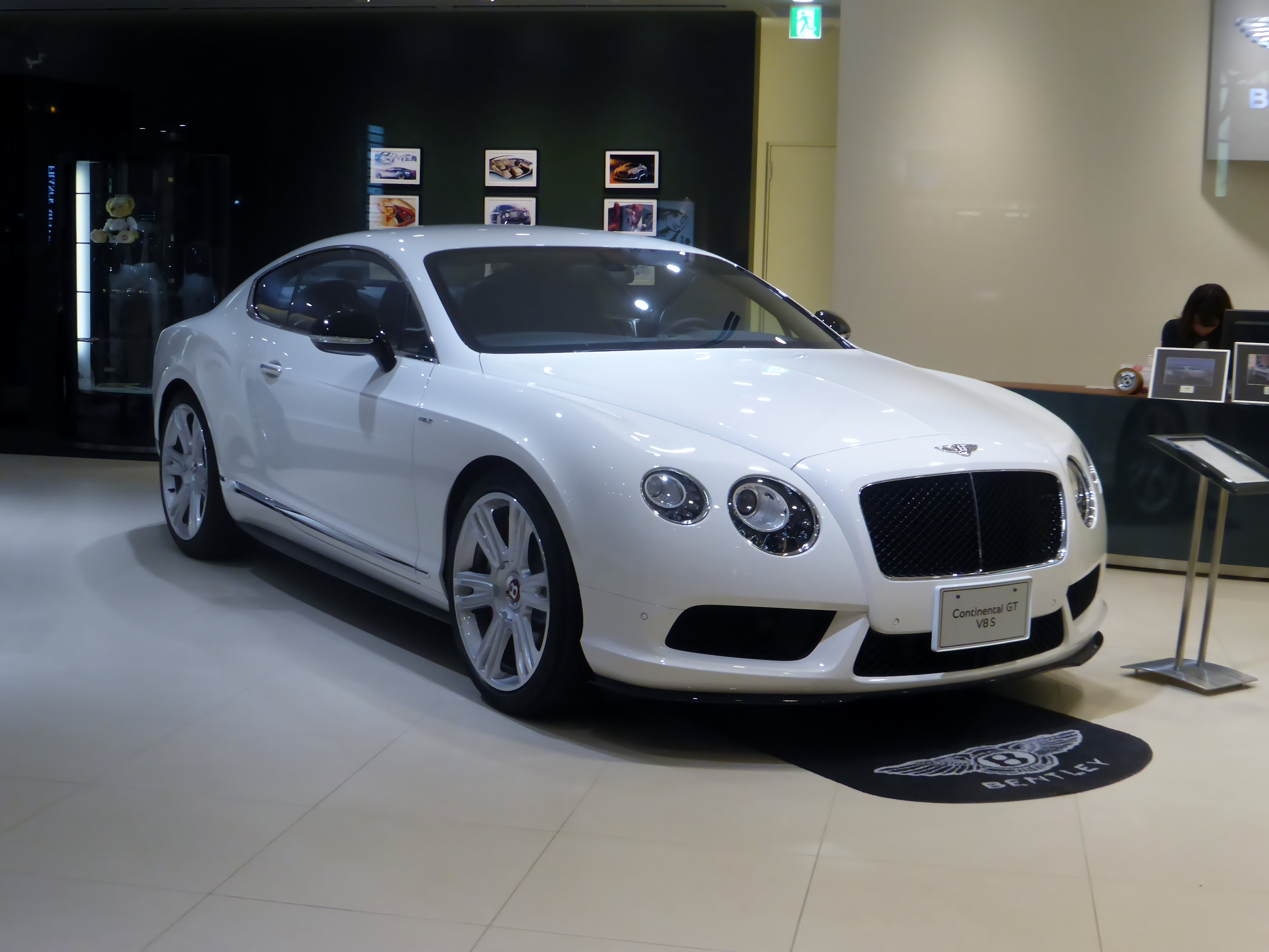 2代目ベントレー・コンチネンタルGT V8 Sをフロントから撮影。